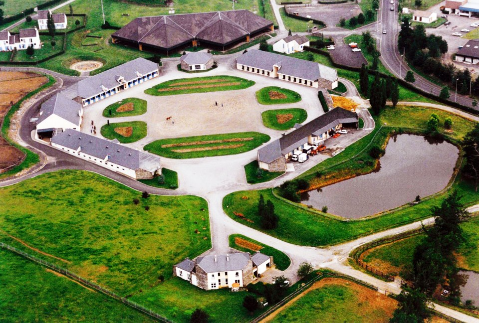 Haras national d'Aurillac